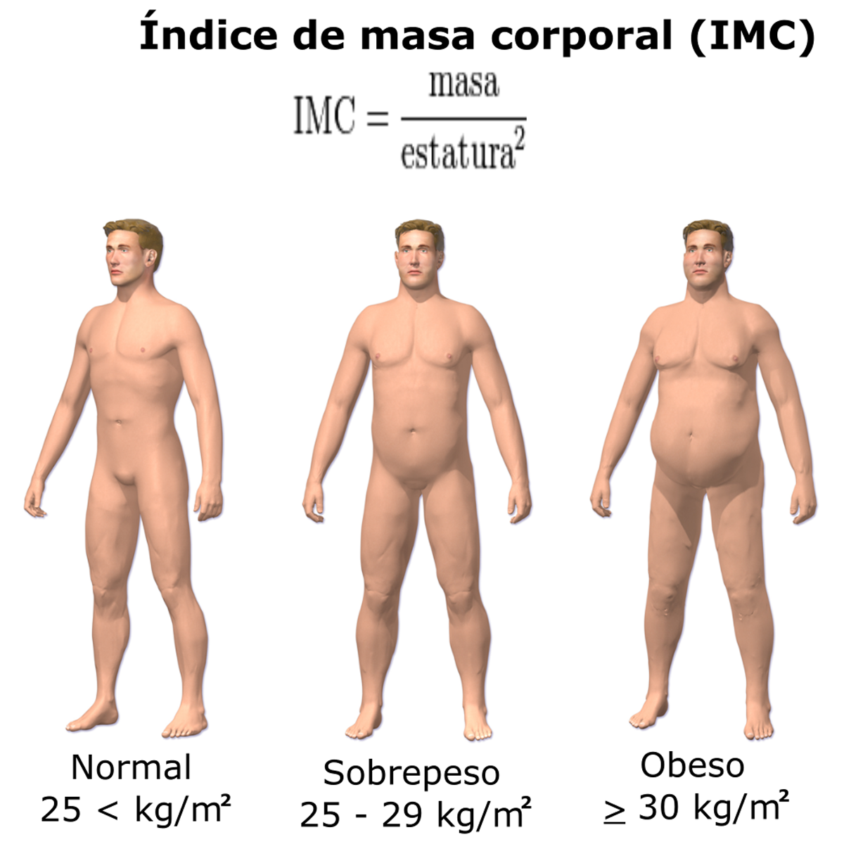 Obesidad. Ir a [1] para ver una animación de este tema médico.